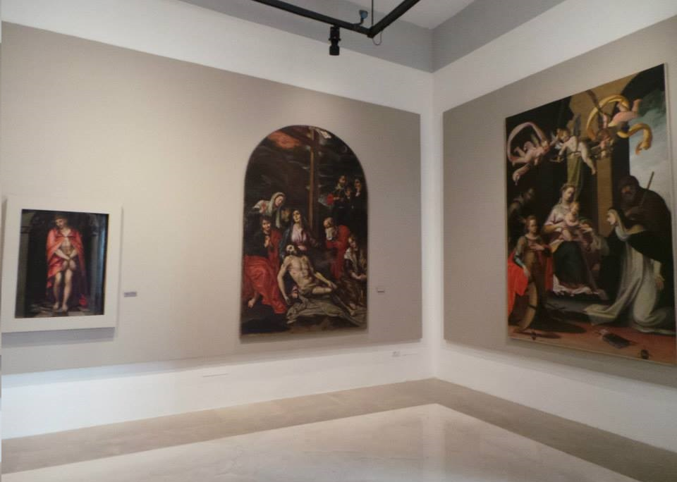 Sezione rinascimentale museo diocesano